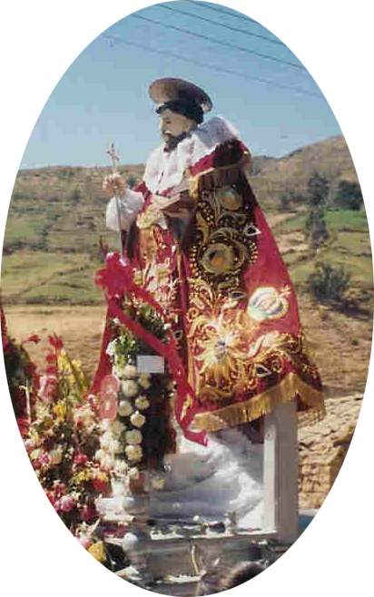 Vista,del Patrón Santo Domingo de Guzmán de la ciudad de Ocros.